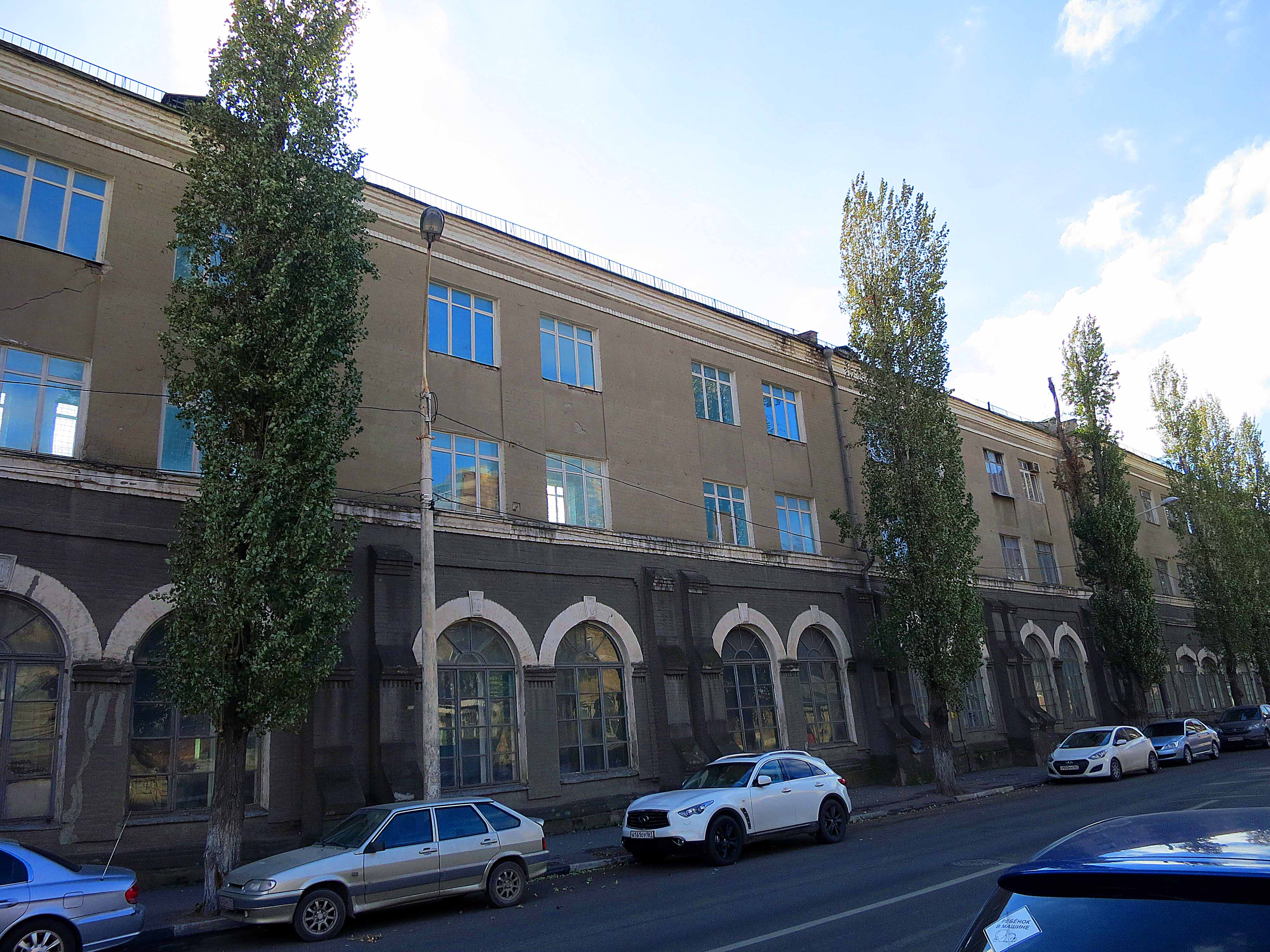 Здание ростовских мореходных классов. Здесь учился полярный исследователь Г.Я. Седов: улица Седова, 8, Ростов-на-Дону, Ростовская область